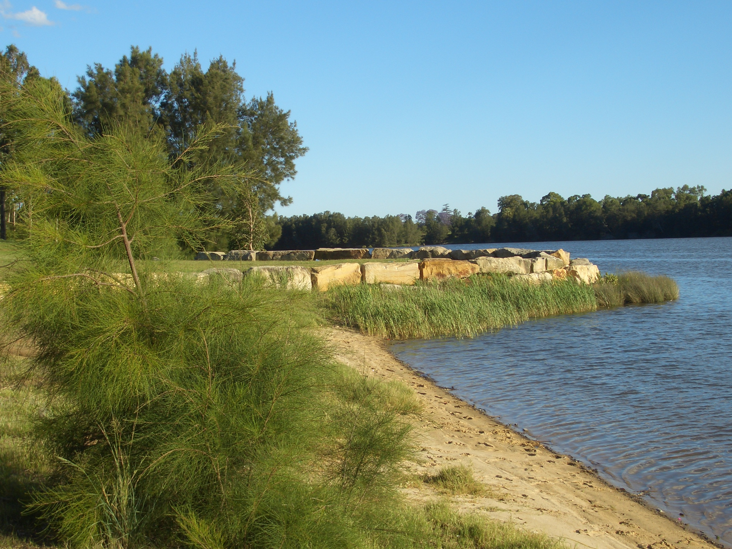 Lansvale, Floyd Bay